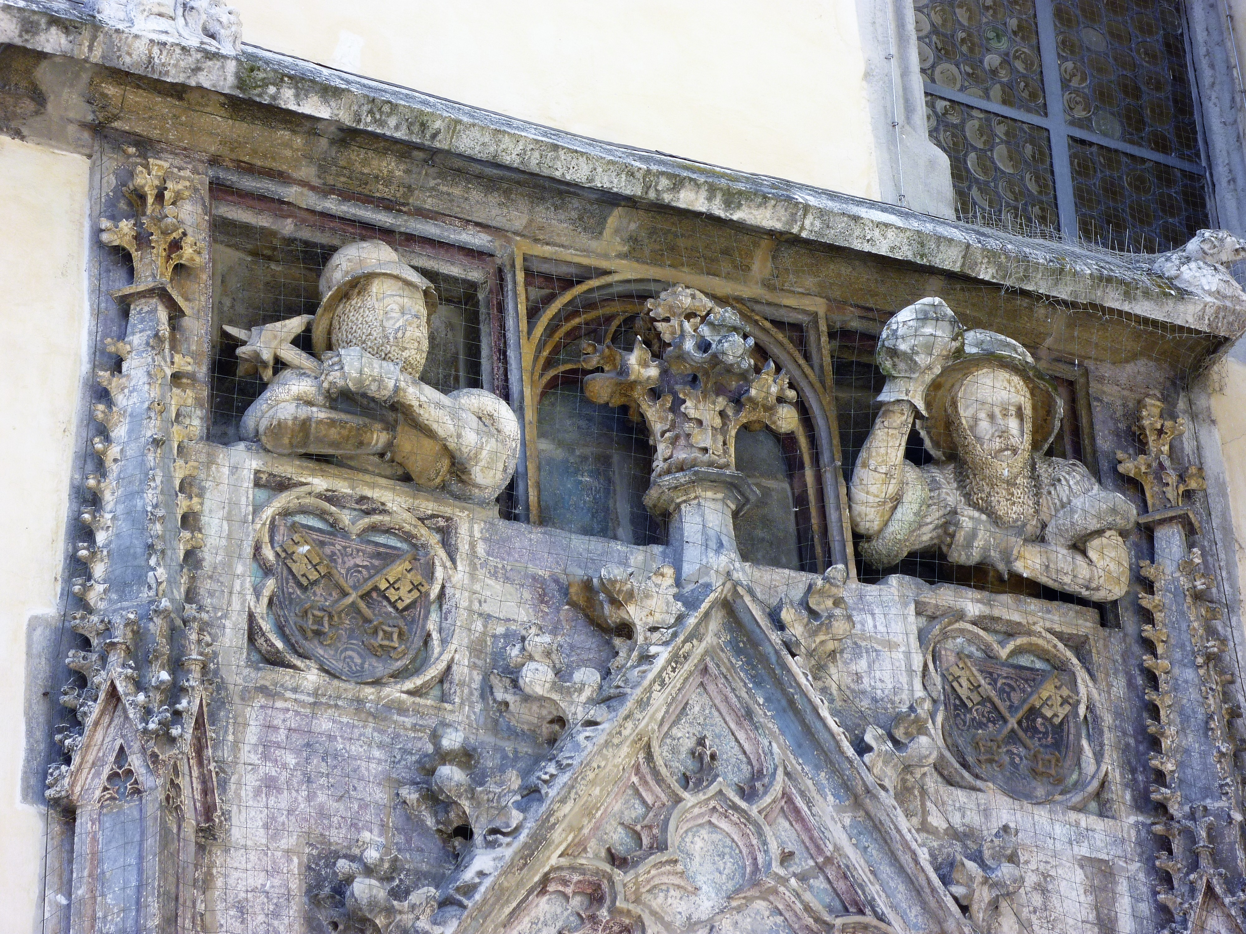 "Schutz und Trutz" am Eingang zum Alten Rathaus in Regensburg.This is a photograph of an architectural monument.